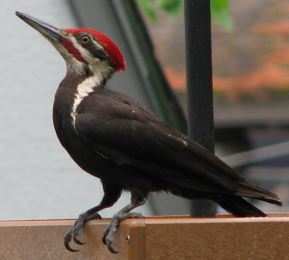 Grand pic mâle (Dryocopus pileatus)